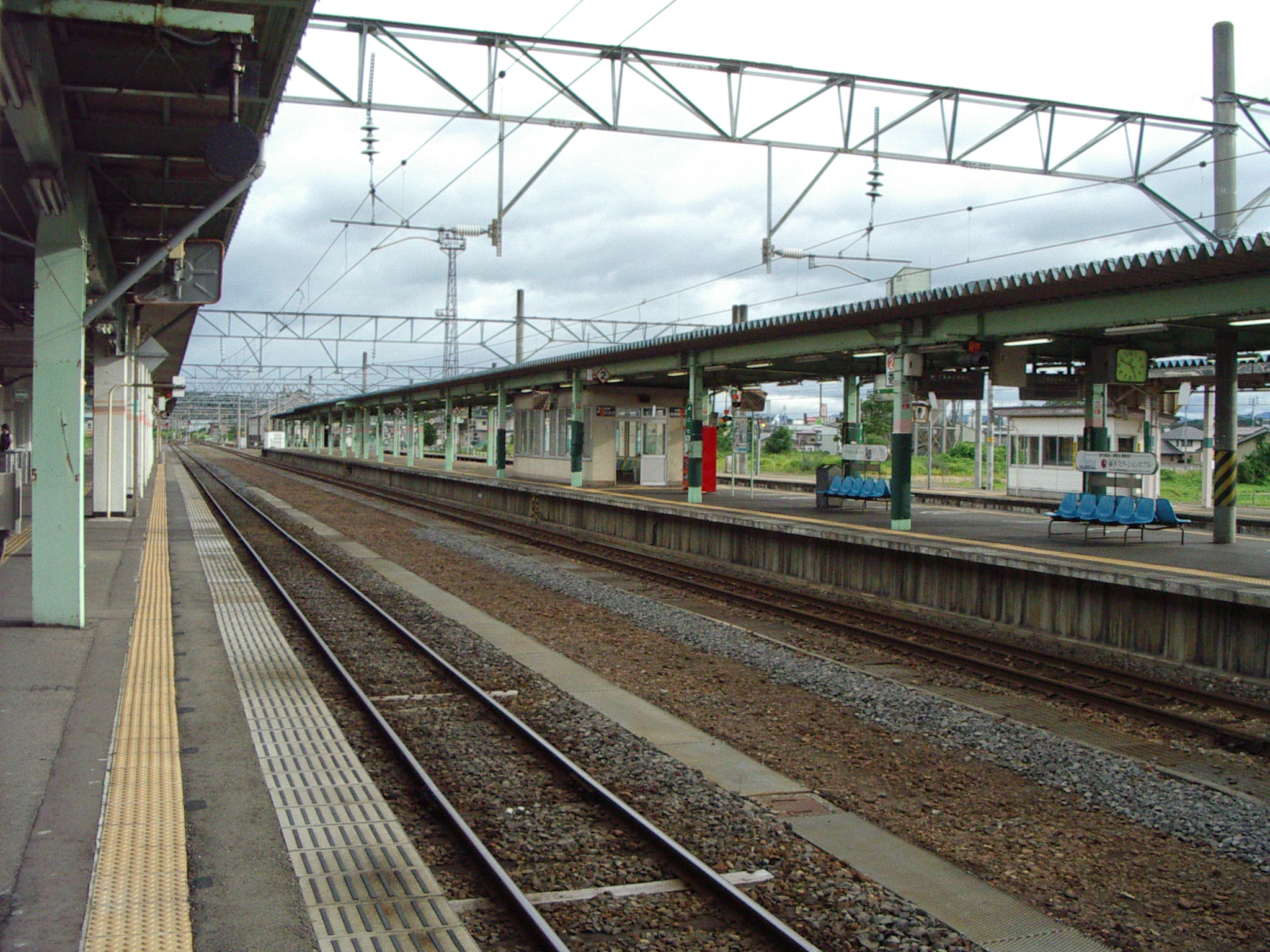 横手駅駅構内写真